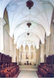 Tulebrasko monastegia